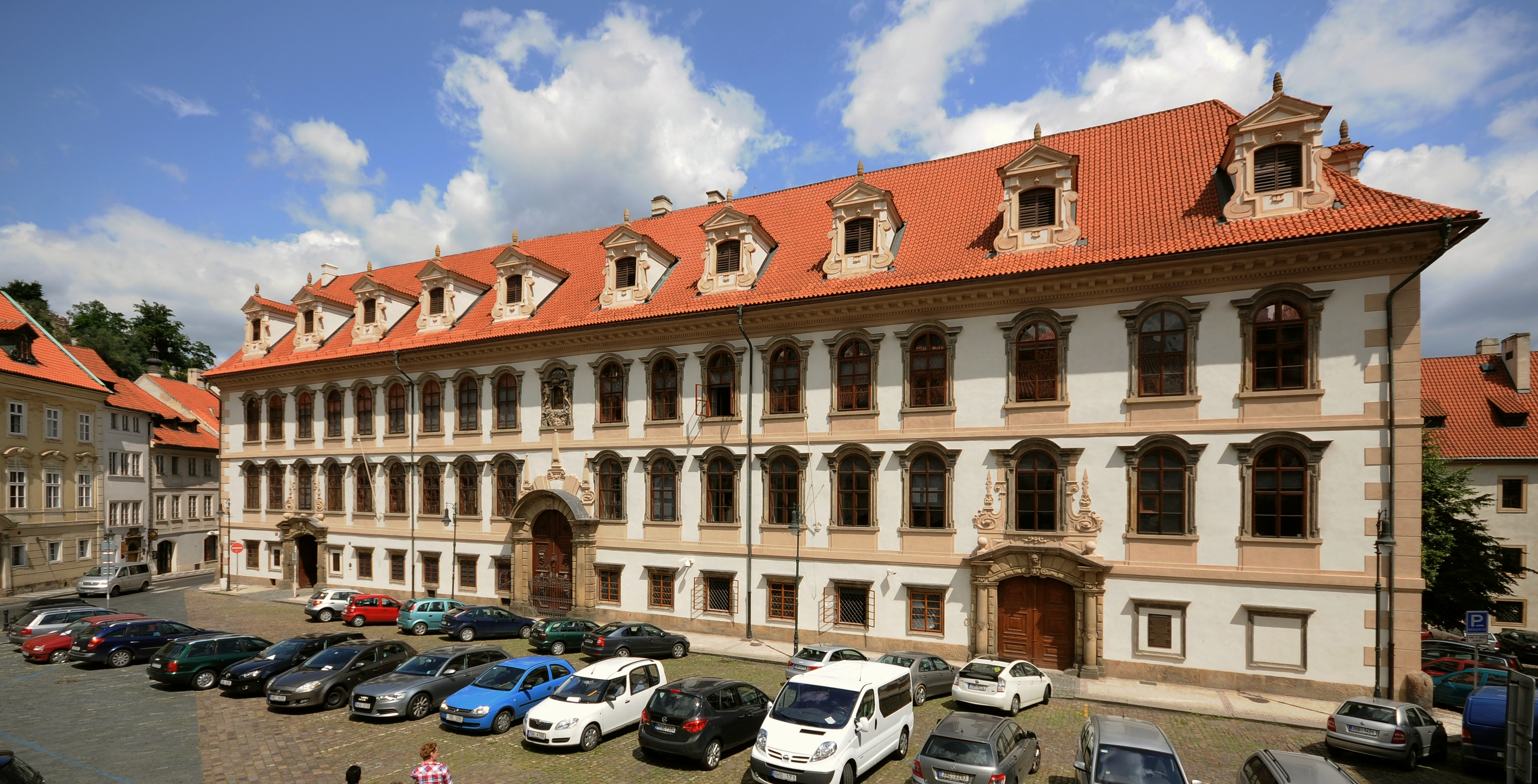 Valdštejnský palác, Praha 1-Malá Strana, Valdštejnské náměstí 17/4, Valdštejnská 17/1, 17/3, Malá Strana.